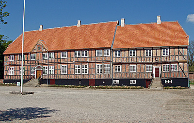 Lyngbygård er en herregård vest for Århus